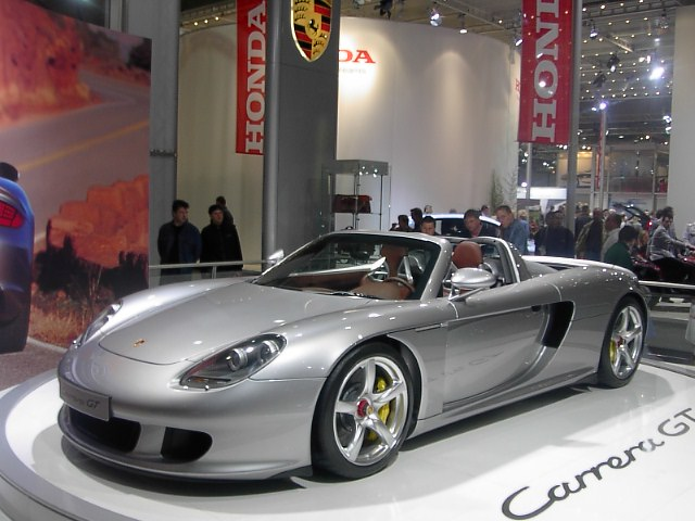 Porsche Carrera GT (2003)